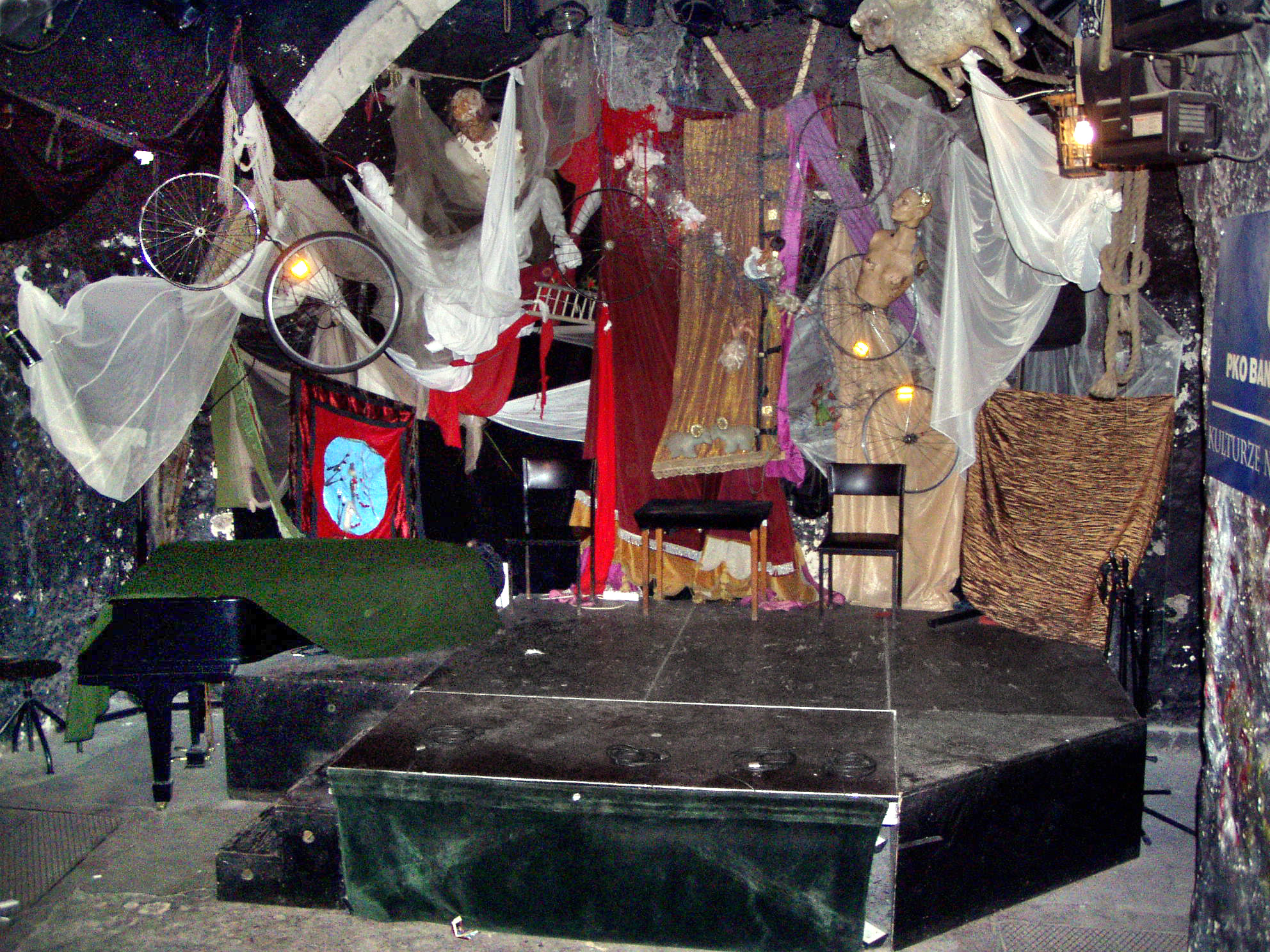 Scena Piwnicy pod Baranami.